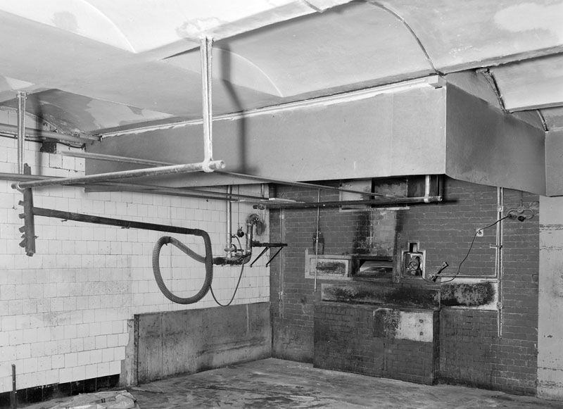 Storgatan 27, Schröders bageri. Bageriinteriör före rivning